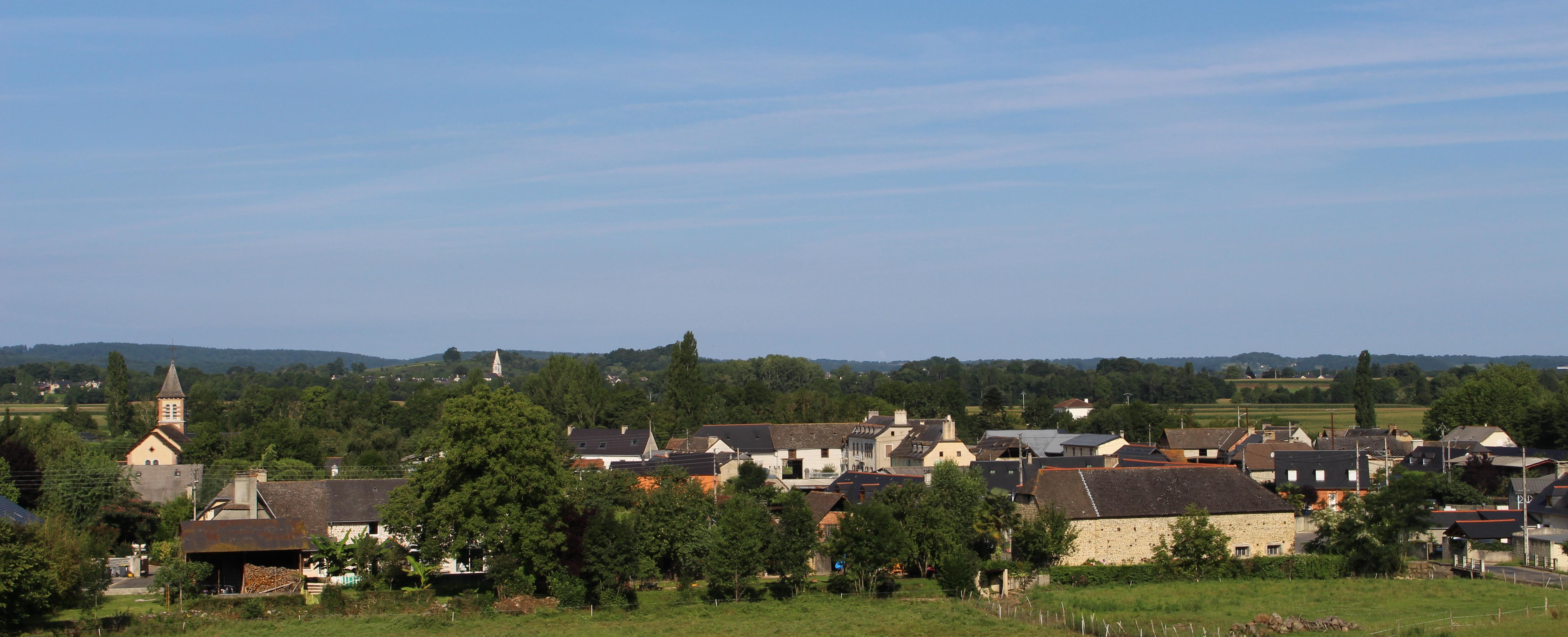 Hibarette (Hautes-Pyrénées)